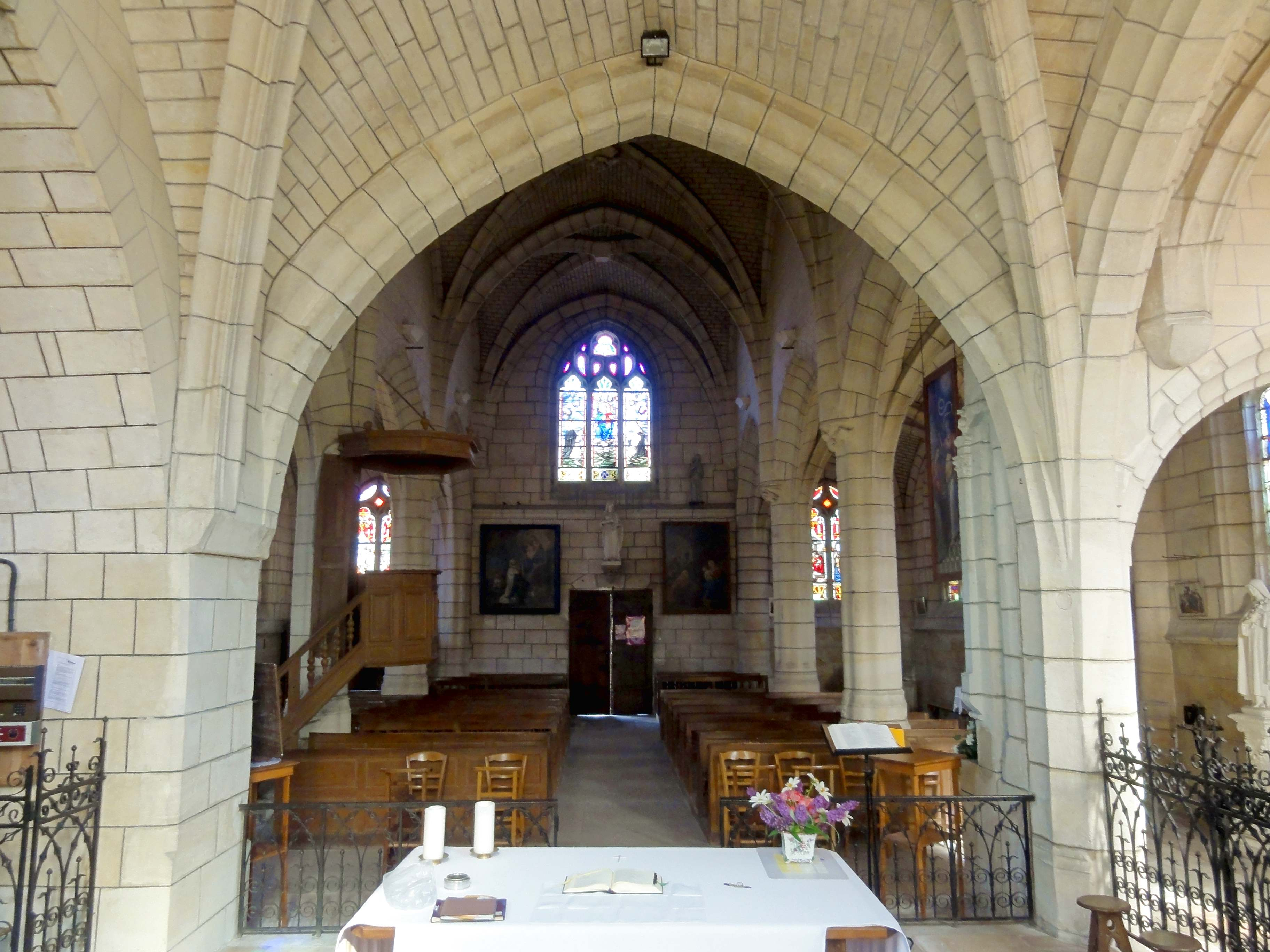 Intérieur de l'église (voir titre).